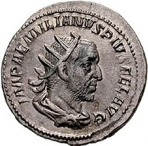 Portret van Aemilianus op een antoninianus.